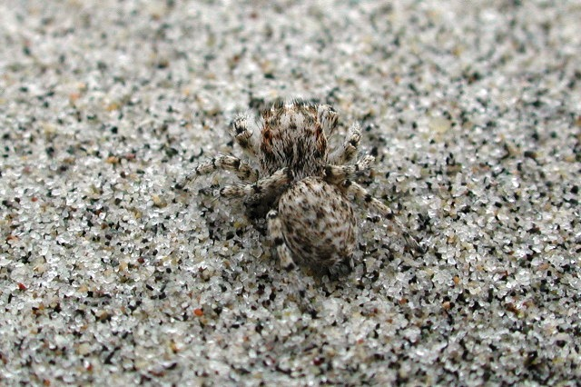 Female Habronattus ustulatus from Baja California.